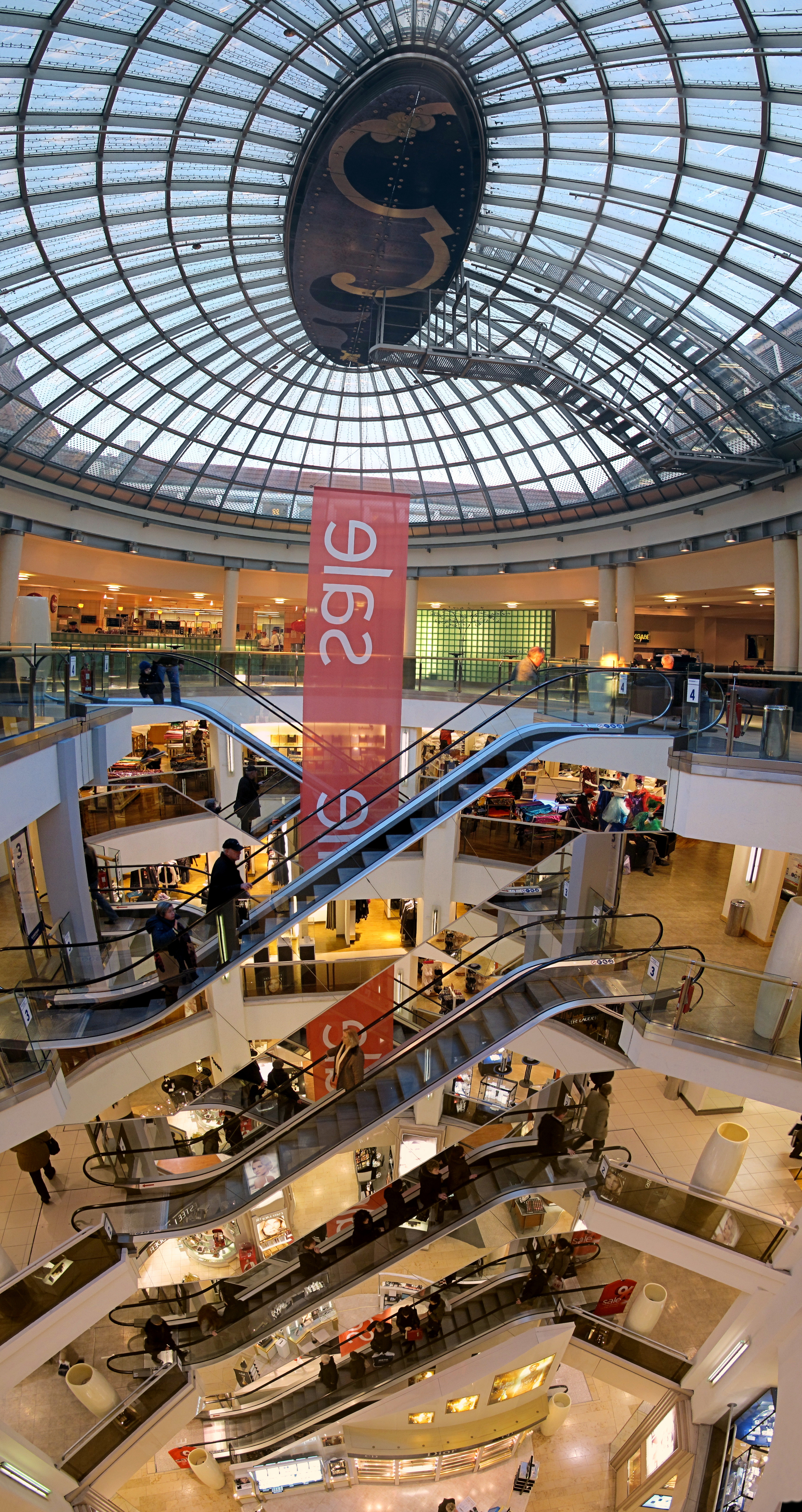 Deutschland, Bayern, München, erbaut 1905, früher Tietz AG, dann Hertie, heute Karstadt am Hauptbahnhof, Lichthof, Rolltreppen über vier Etagen bis zur Glaskuppel (2012)